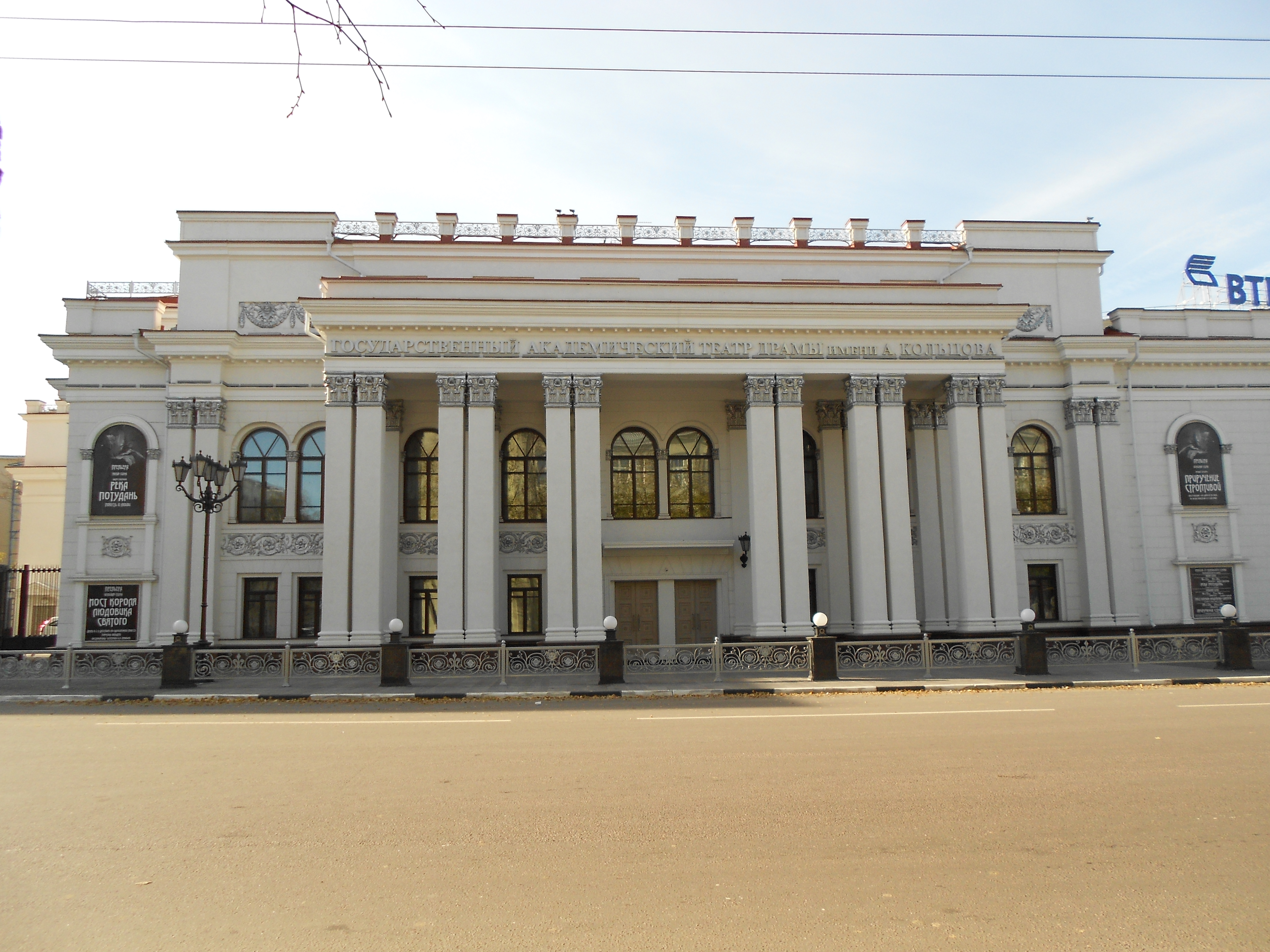 Здание Воронежского драматического театра, где выступали Щепкин М. С., Мочалов П. С., Ермолова М. Н., Камиссаржевская В. Ф. и др. Здесь в 1919 году Перед трудящимися города выступал на митинге Калинин М. И. (Воронежская область, Воронеж, Революции пр., 55)